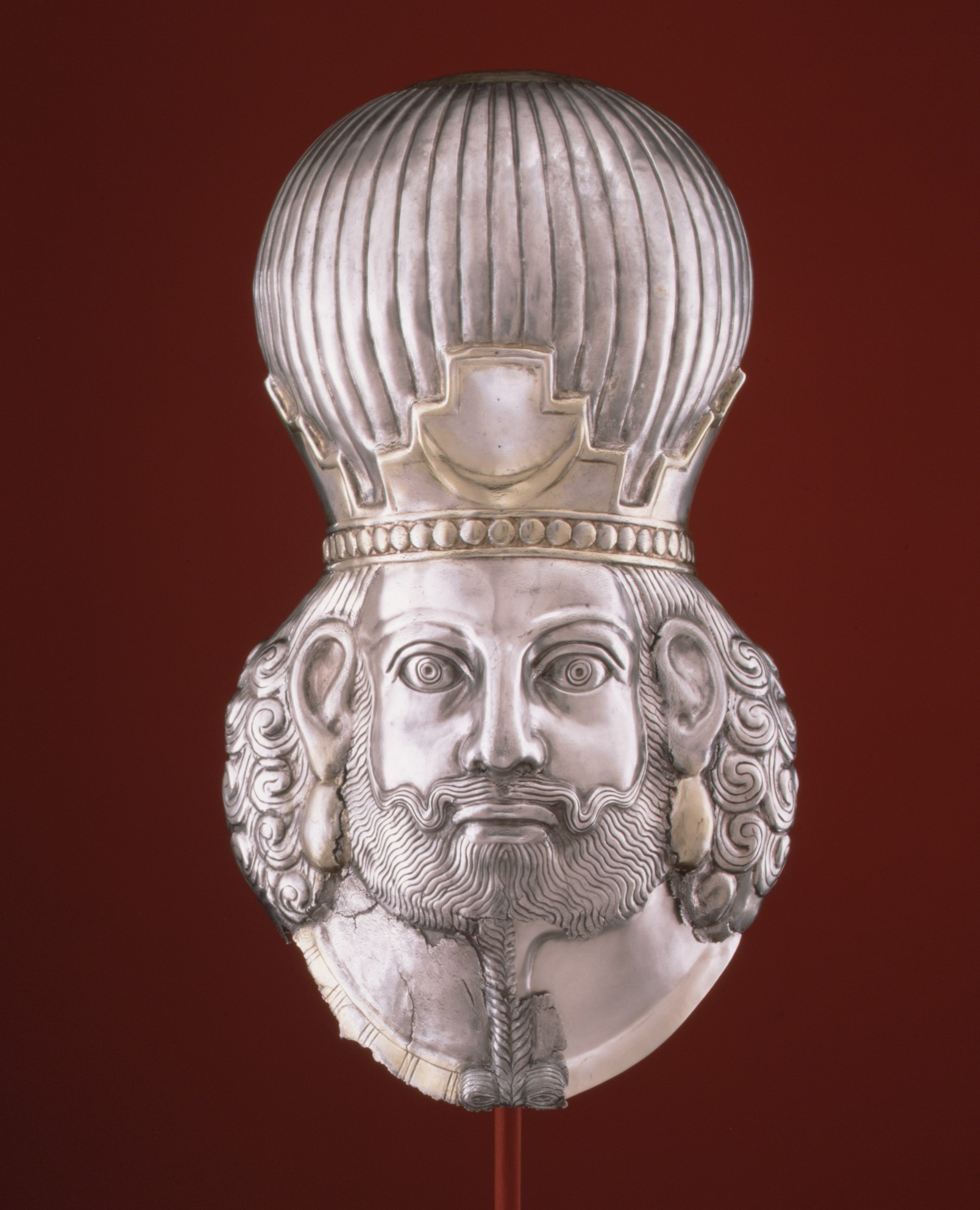 Sasanian; Sculpture; Metalwork-Sculpture